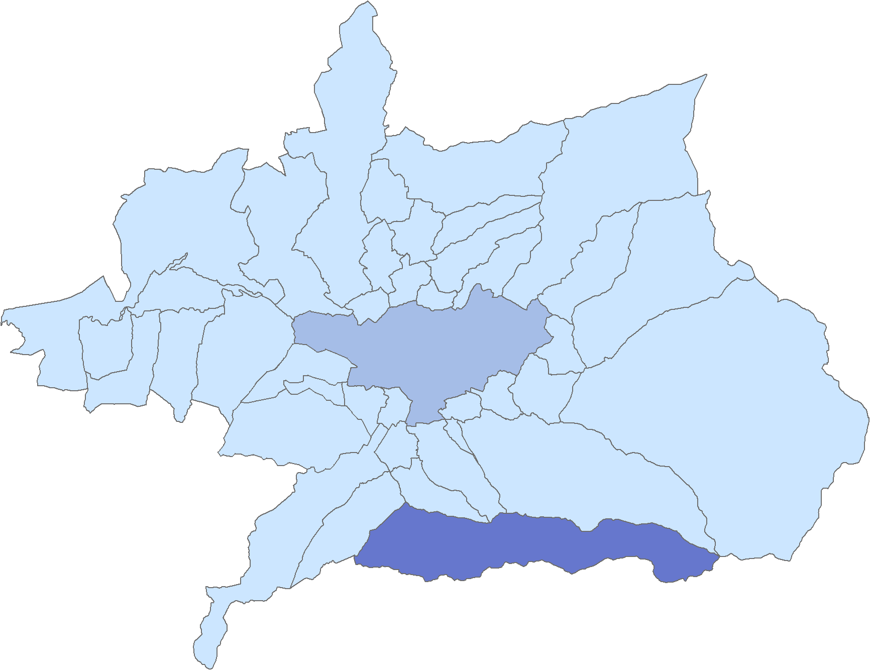 Situación del municipio de Dílar respecto a la comarca de la Vega de Granada, en España.